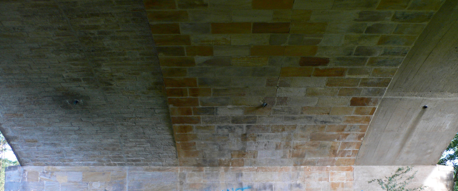 Siebenbogenbrücke in Fürth, Blick auf einen der Bögen: links der Anbau von 1891 für die Bahnstrecke Nürnberg–Bamberg, in der Mitte die ursprüngliche Brücke von 1863 für die Bahnstrecke Fürth–Würzburg, rechts der Anbau von 1900 für die Rangaubahn